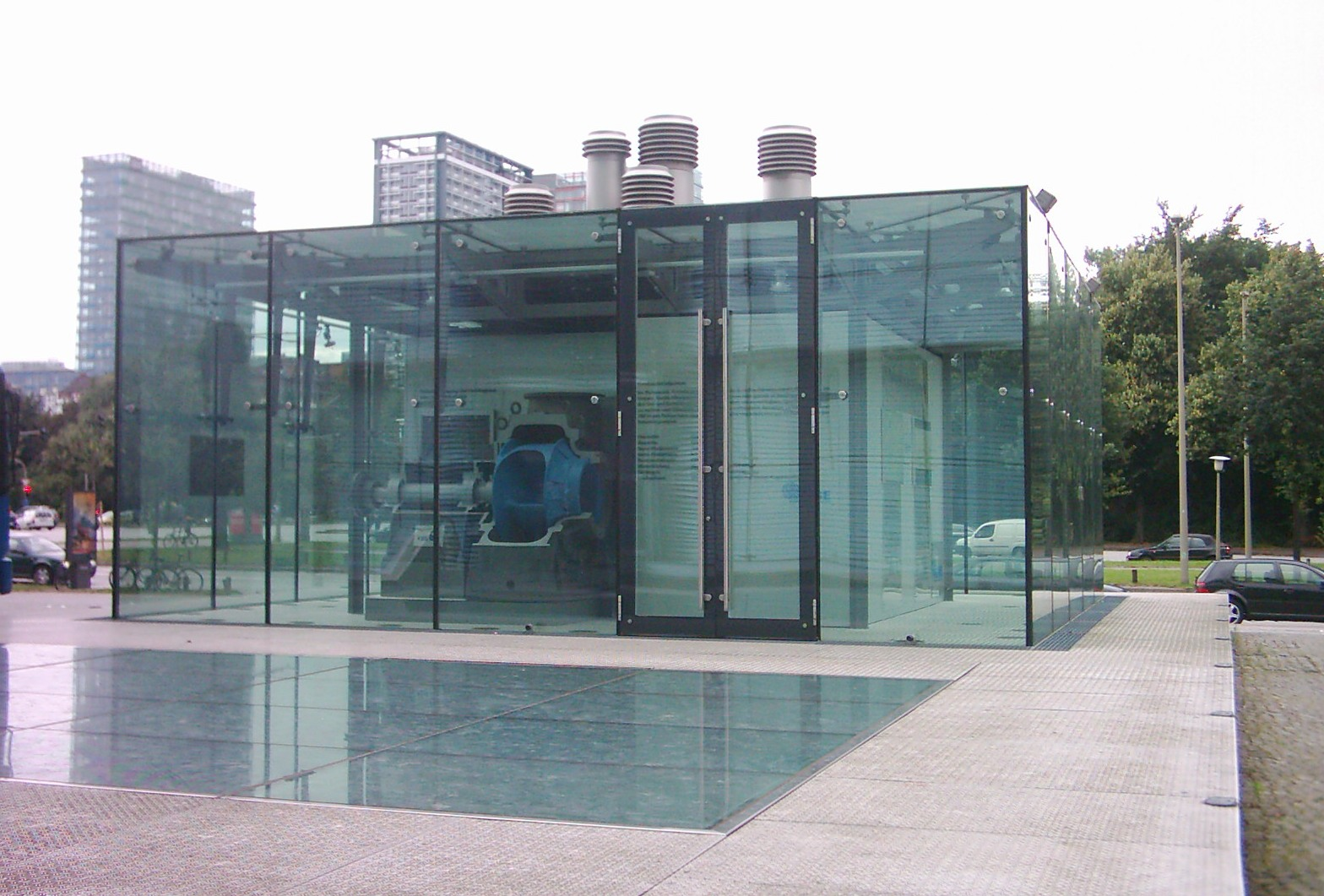 Das Pumpwerk Ankelmannsplatz der Hamburger Stadtentwässerung. Hamburg-Hammerbrook, direkt vor dem Berliner Bogen.